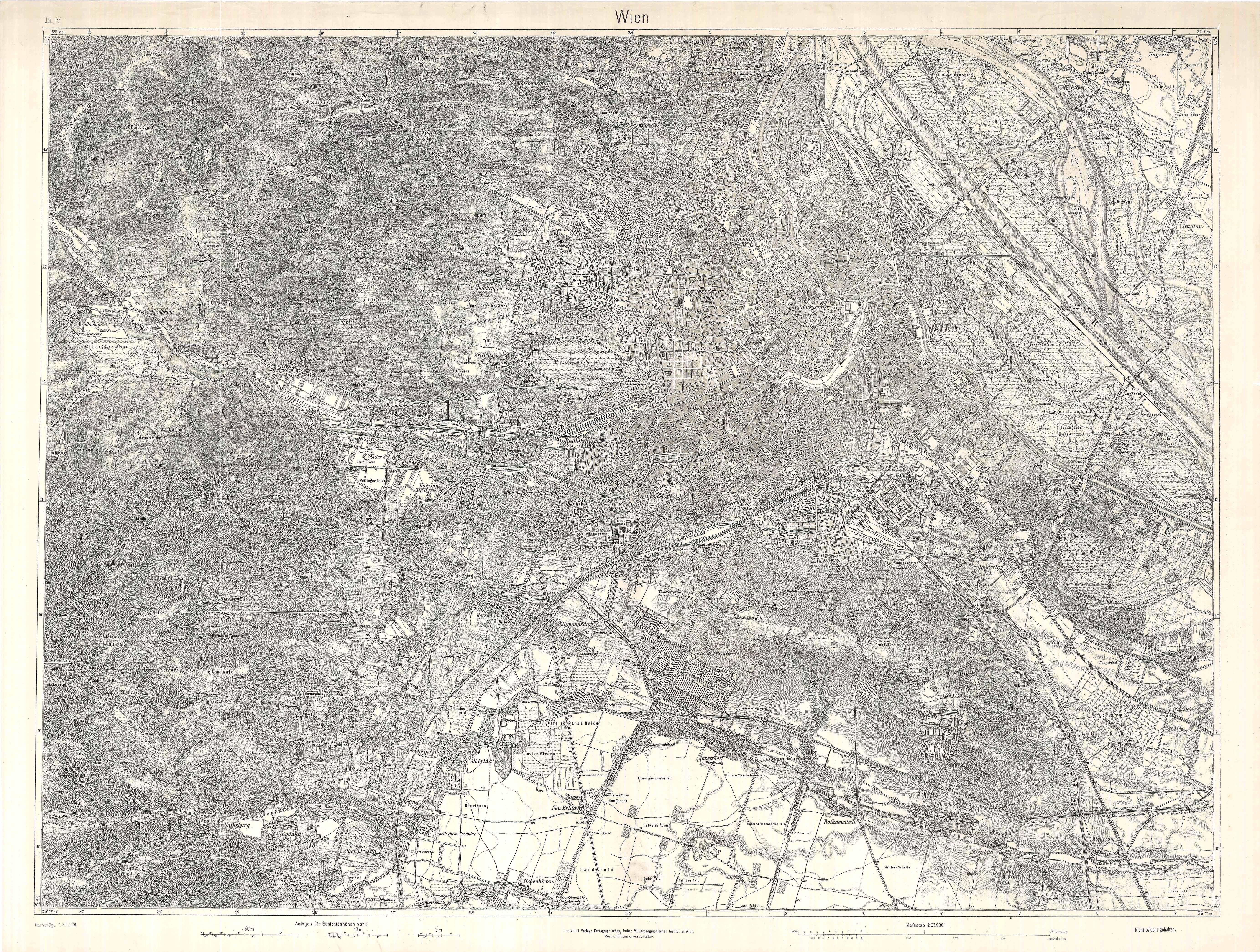 historische Landkarte 1:25.000. Süden von Wien im Bereich Hohe Wand - Döbling - Alte Donau - Kledering - Kalksburg - Weidlingau